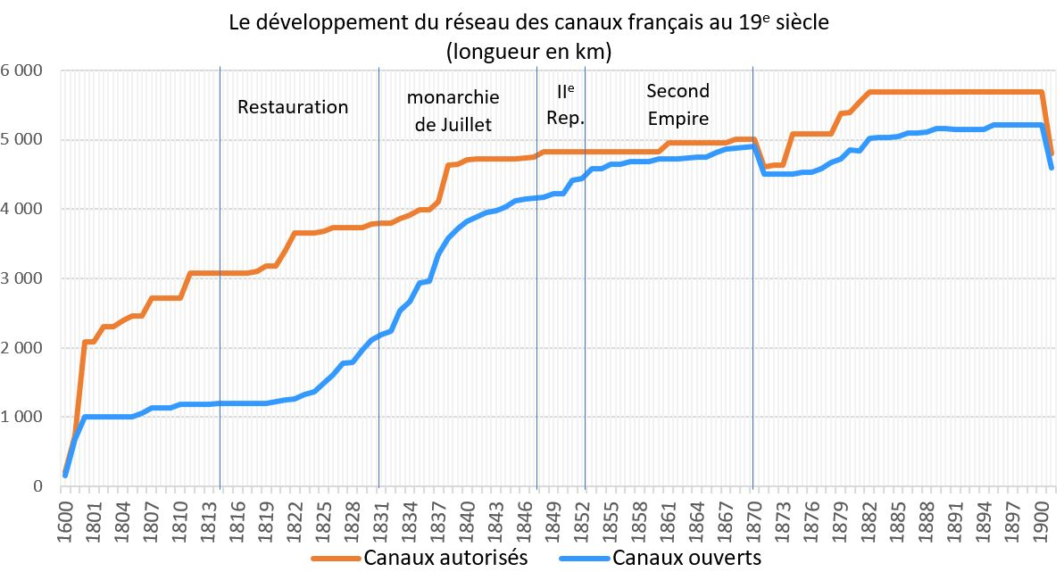 Développement du réseau canaux au XIXe siècle